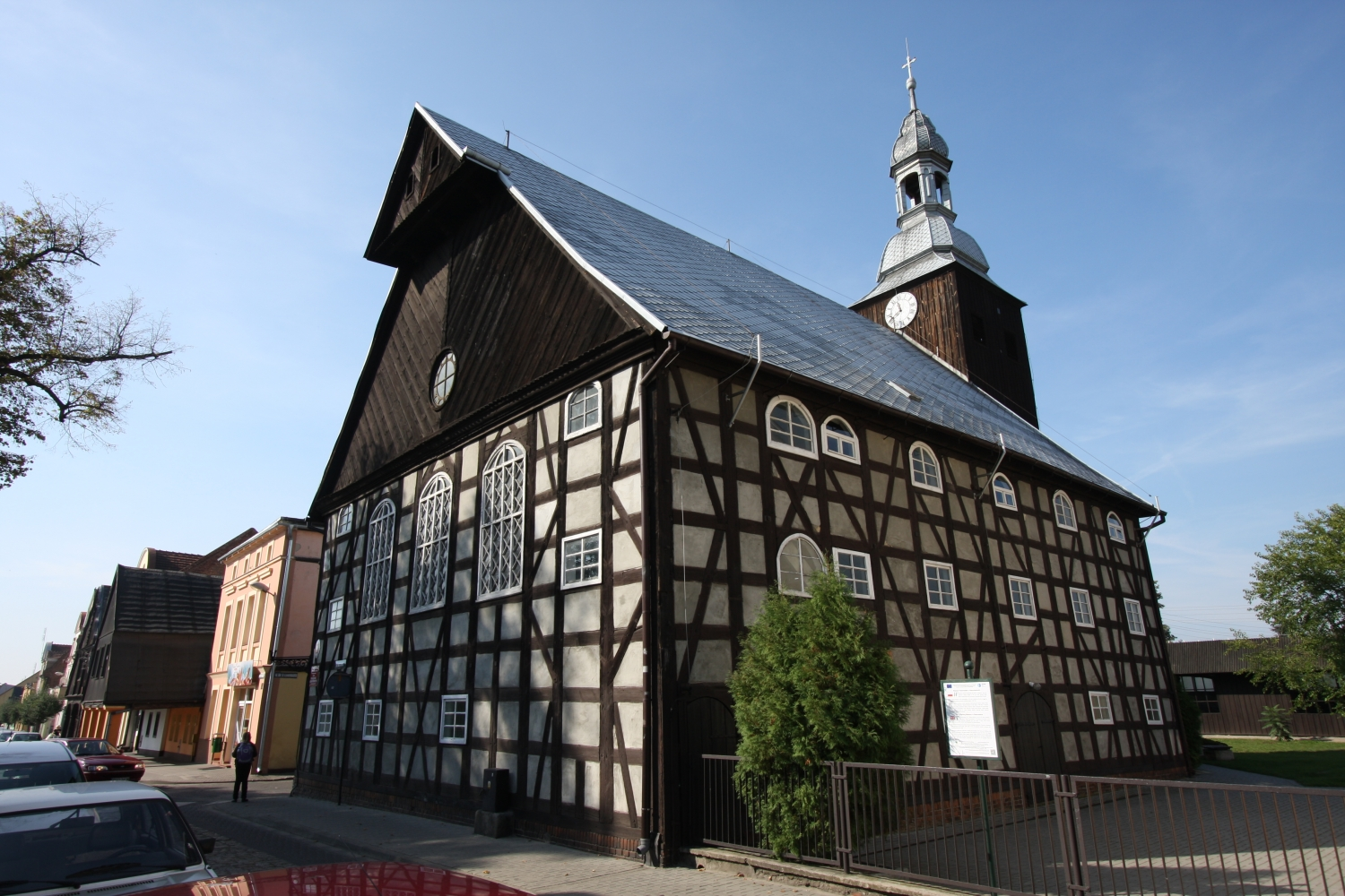 Rakoniewice, kościół ewangelicki, ob. muzeum pożarnictwa, szach., 1763